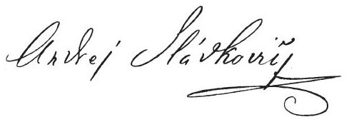 Podpis Andreja Sládkoviča